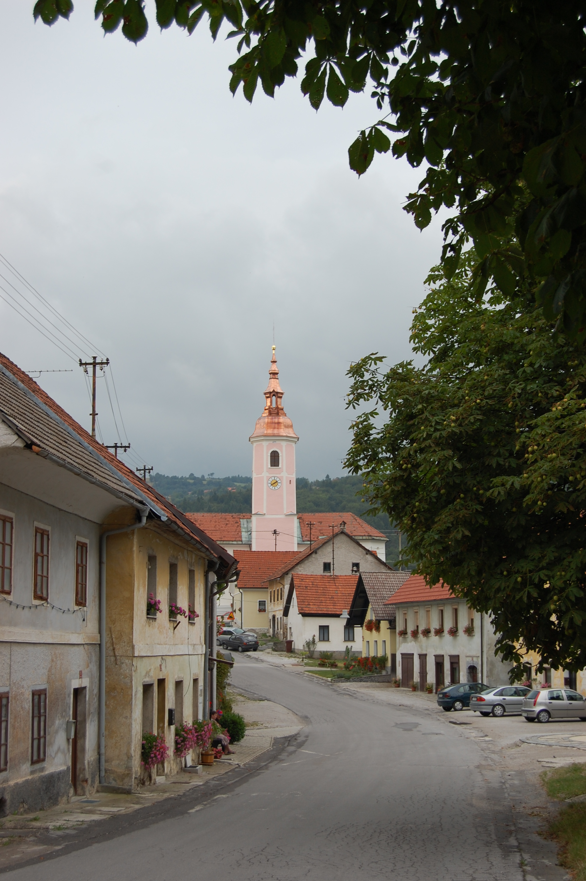 Visnja Gora town